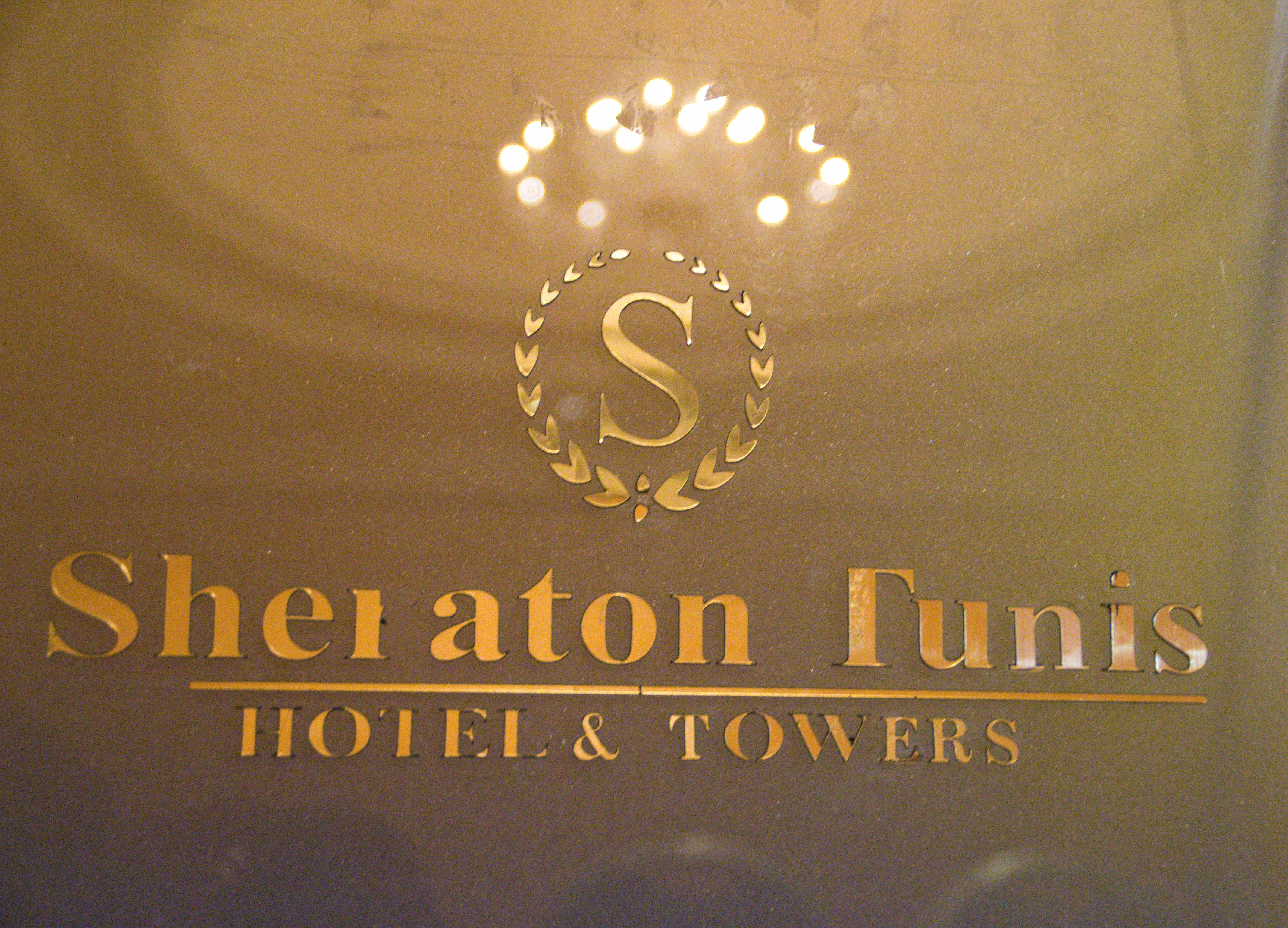 Pupitre de conférence avec l'inscription Sheraton Tunis